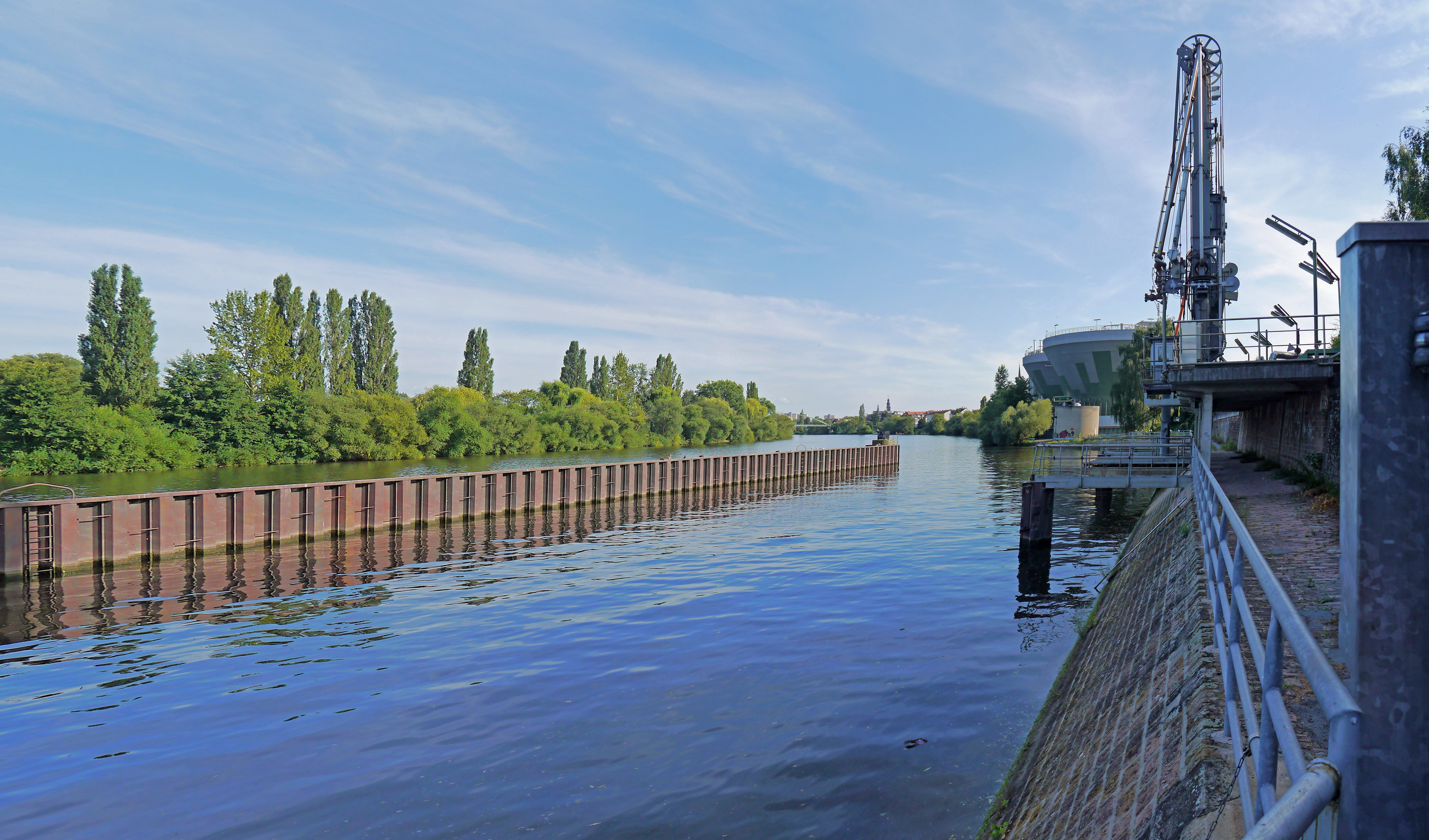 Mainhafen der AllessaChemie in F-Fechenheim, 2012 nahe der Mainkur. Blick flussabwaerts, zum Arthur-von-Weinberg-Steg.